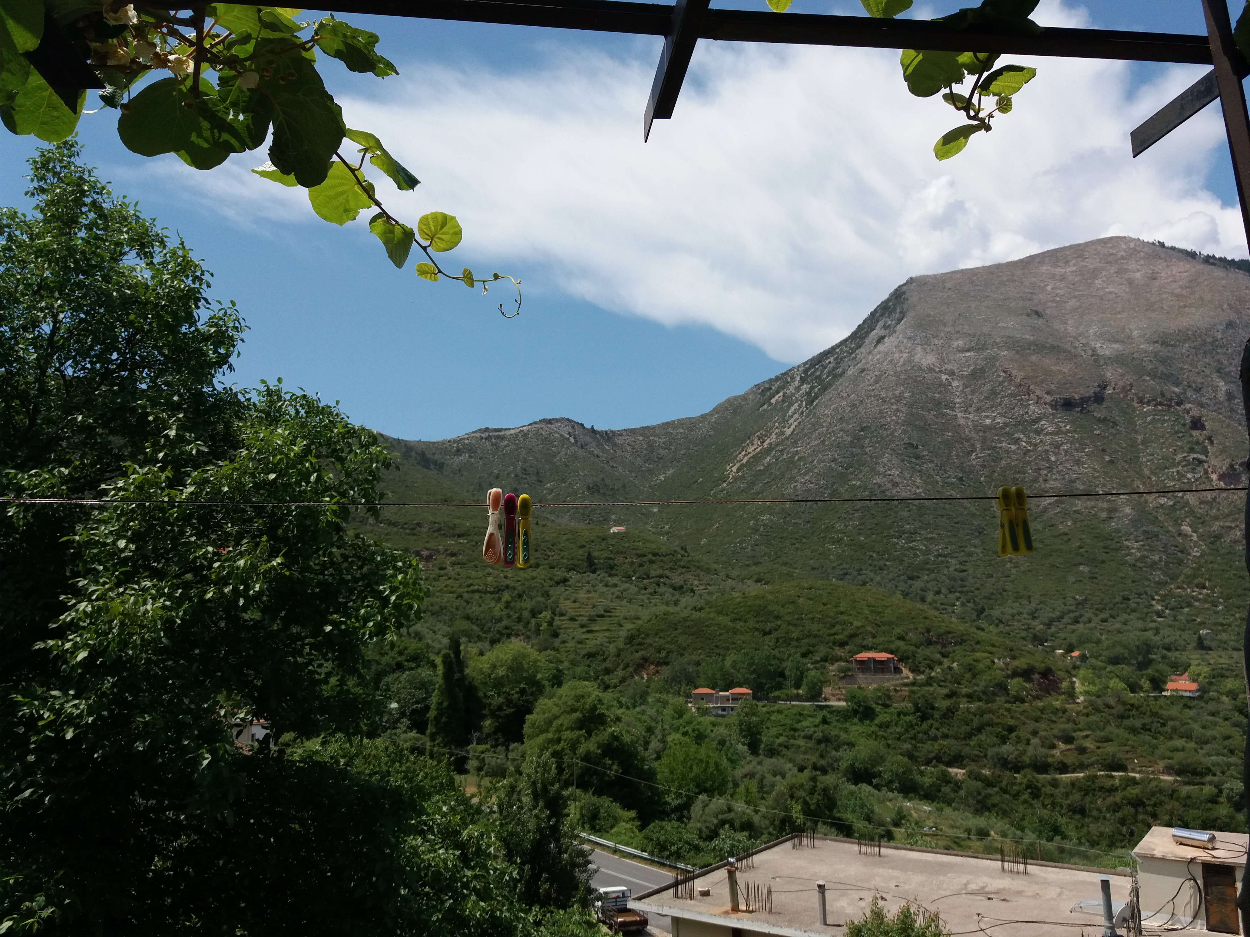 Από Αρτεμισία (ταράτσα Νίκου Μασουρίδη / Κοσυφάκου), οτο Λυκούριο (Αγιώργης) και οι κεραίες. This is a photography of Natura 2000 protected area with ID GR2550006